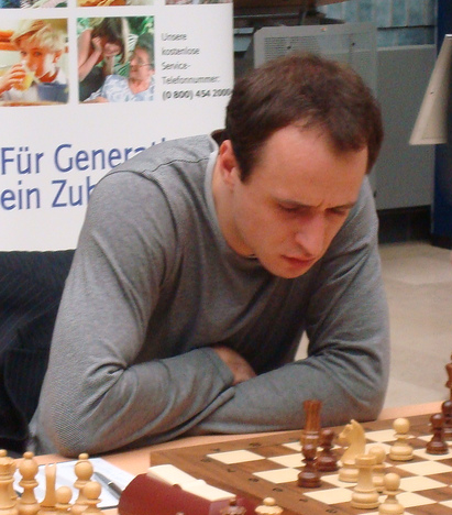 GM Evgeny Miroshnichenko Ukraine, Schachbundesliga 2008